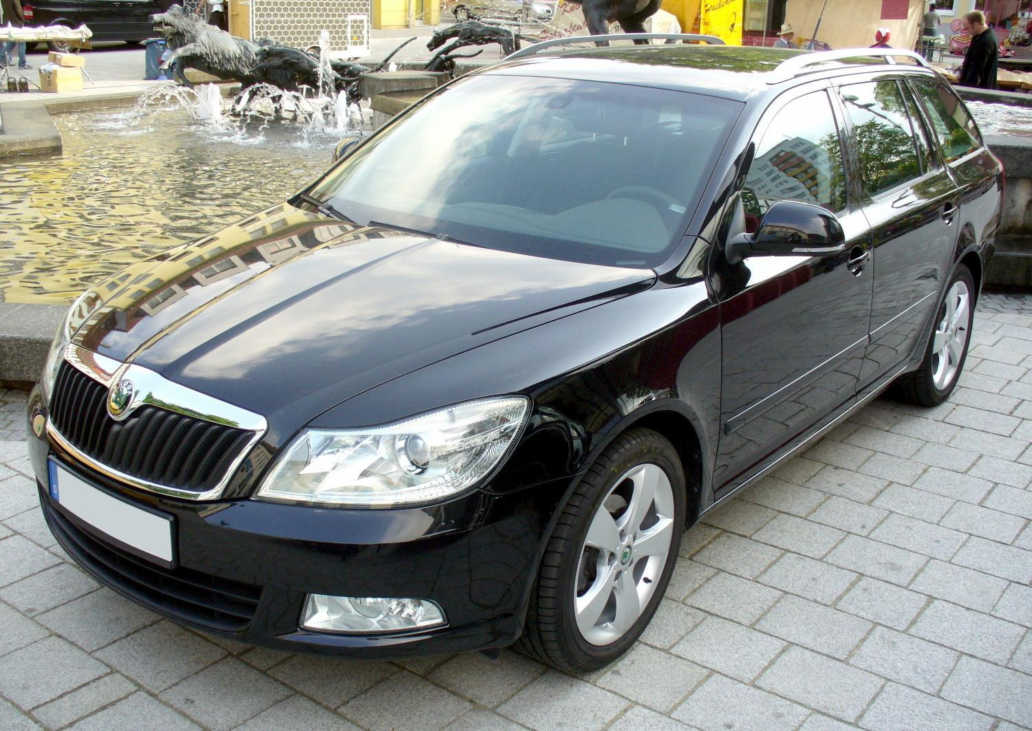 Škoda Octavia II Combi Facelift